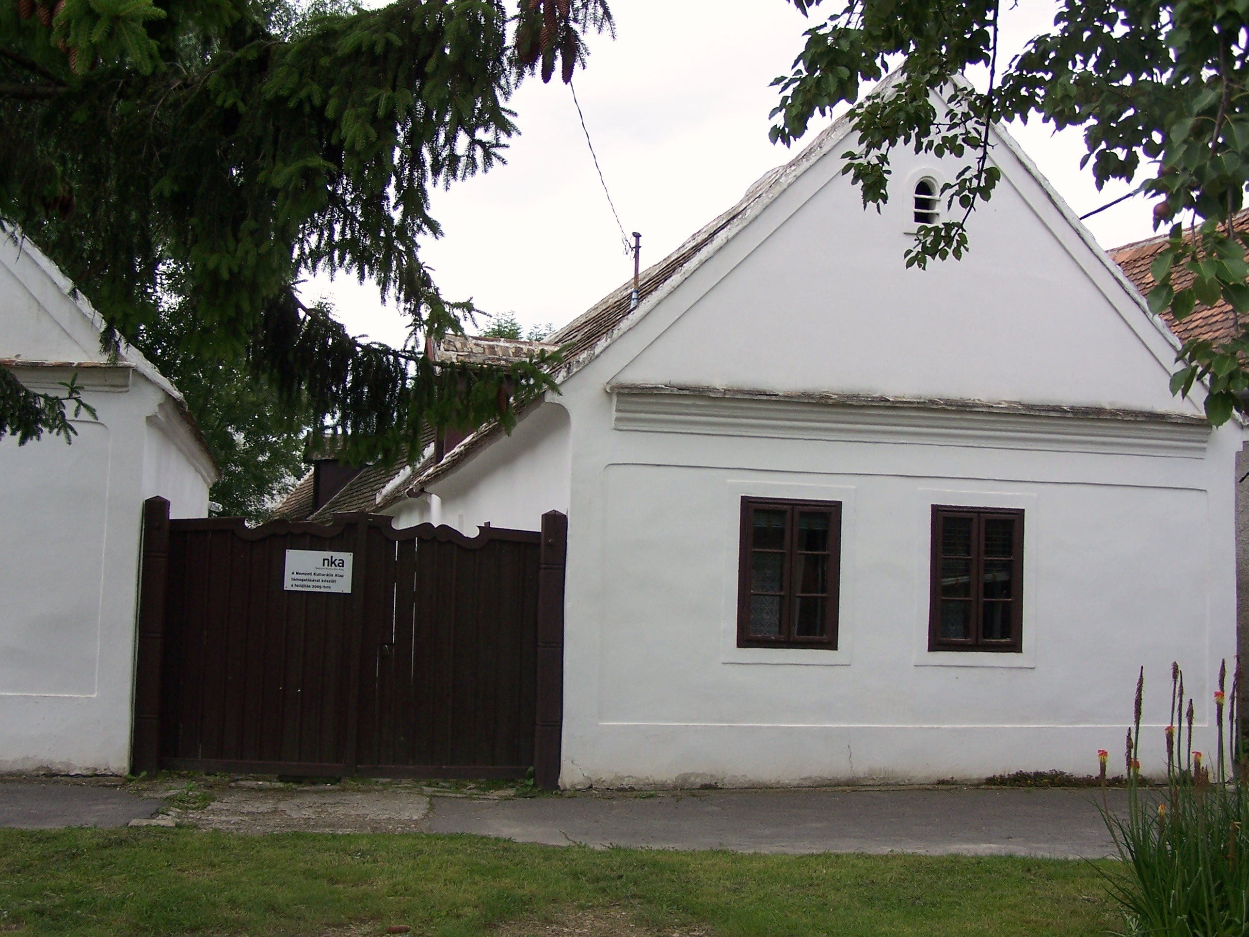 Lakóház, Horvát Nemzetiségi Tájház (Kópháza, Kossuth Lajos u. 15 .)